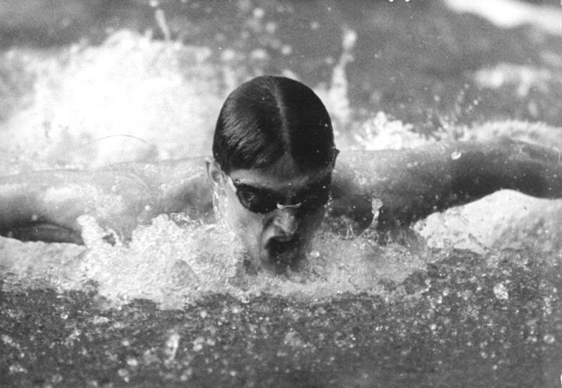 Thomas Dreßler ADN-ZB Kluge 23.5.84 Magdeburg: DDR-Schwimm-Meisterschaften Mit 53,84 s stellte Thomas Dreßler (SC DHfK Leipzig) einen neuen Europarekord über 100 m Schmetterling auf. Die alte Bestzeit war mit 54,00 s im Besitz von Michael Groß (BRD). Abgebildete Personen: Dreßler, Thomas: Schwimmsportler, DDR